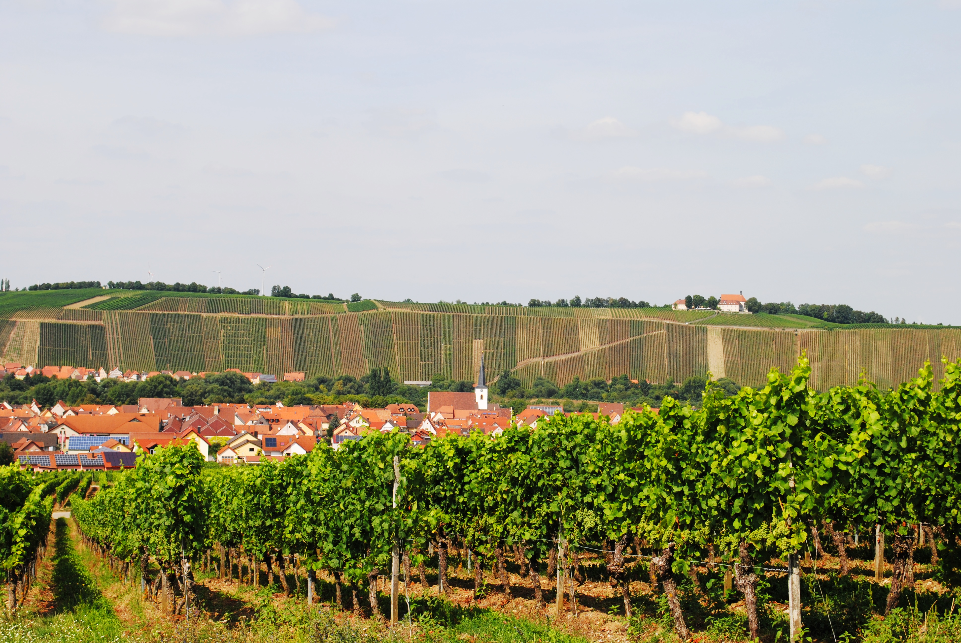 Nordheim, Vogelsburg, vom Kreuzberg aus gesehen, Panorama